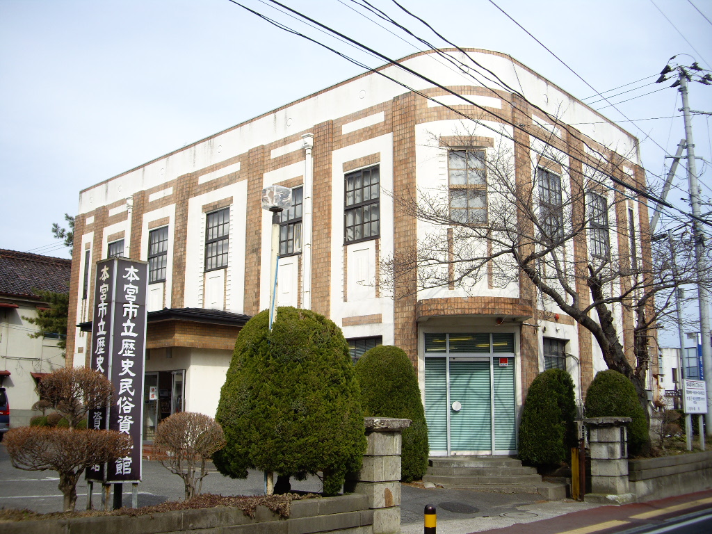 本宮市立歴史民族資料館